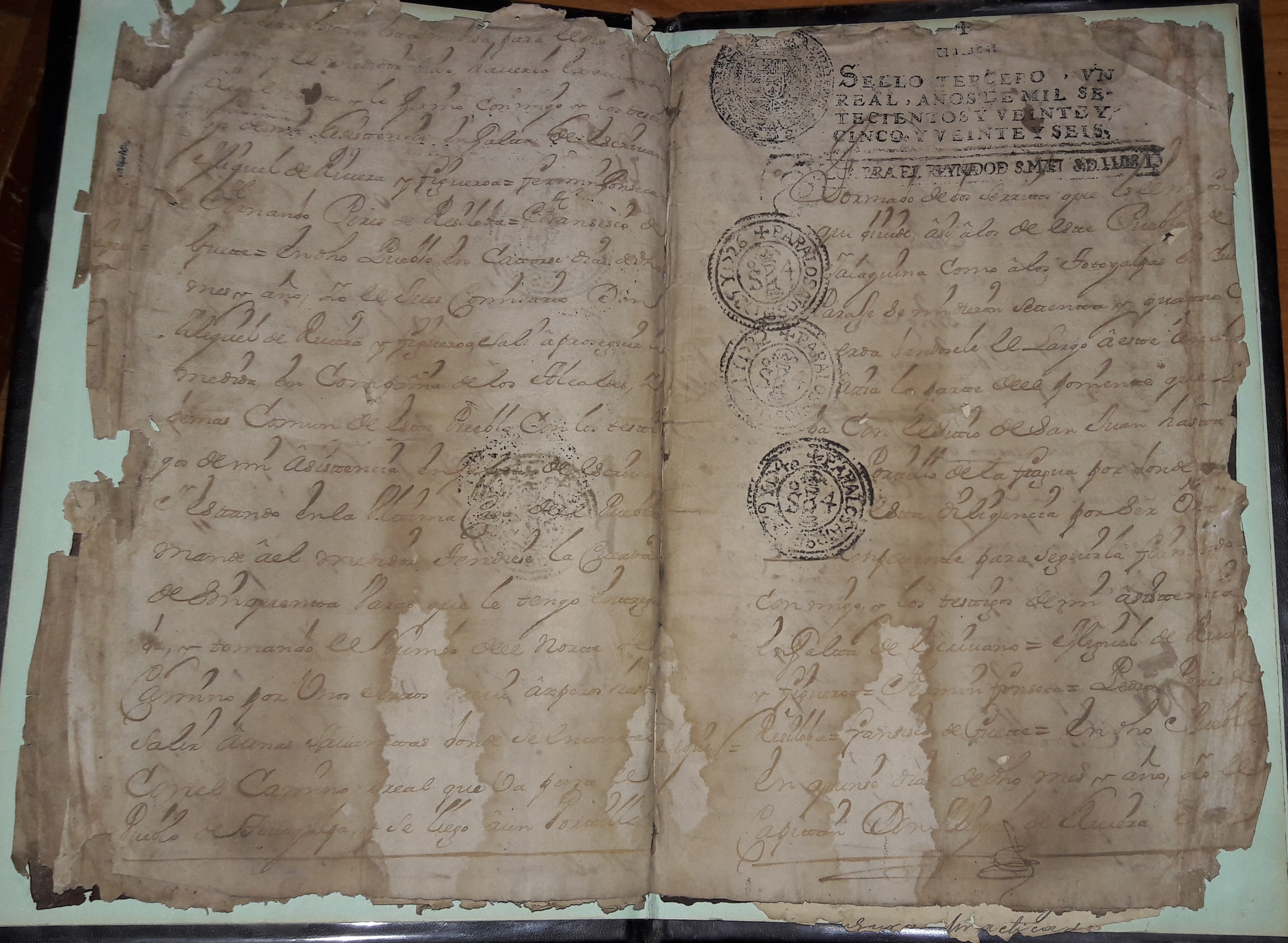 Título Real de Tierra Ejidales del Municipio de Yalaguina